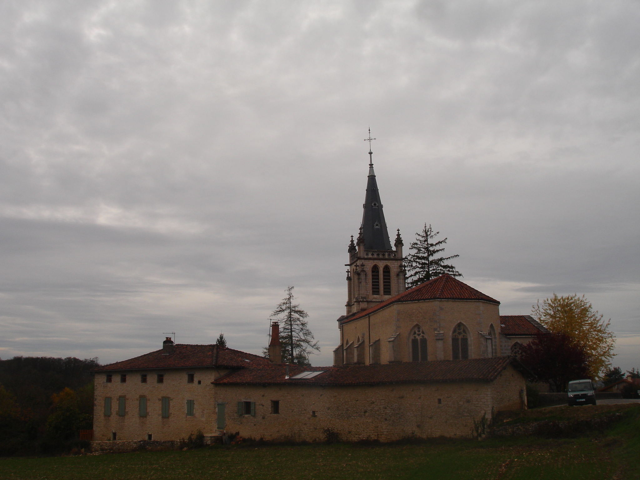 Vue générale de l'église et de la cure